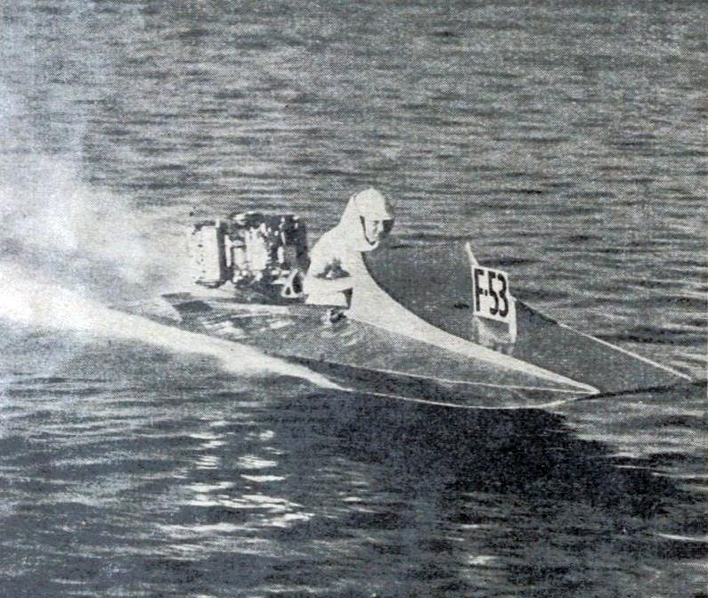 Jean Dupuy champion d'Europe de motonautisme en 1934, à Barcelone.